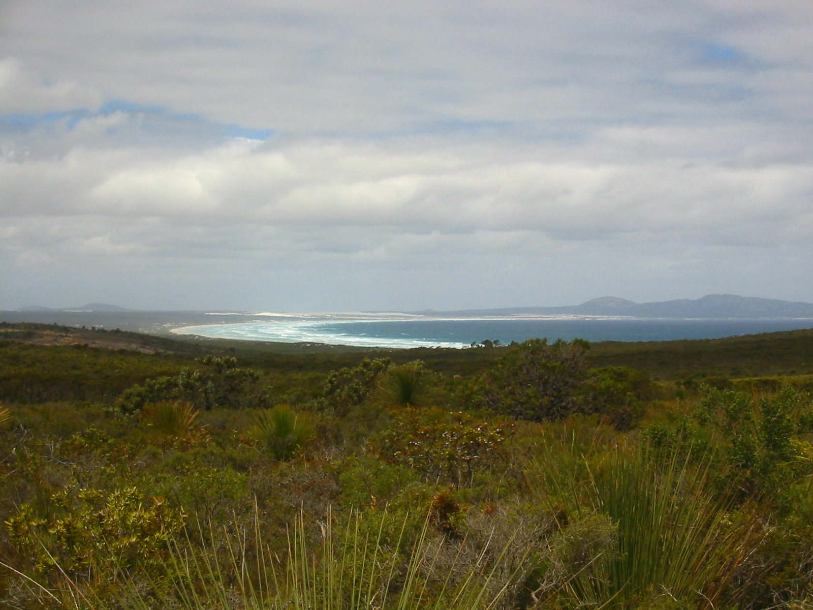 einsame Bucht im Cape Arid NP